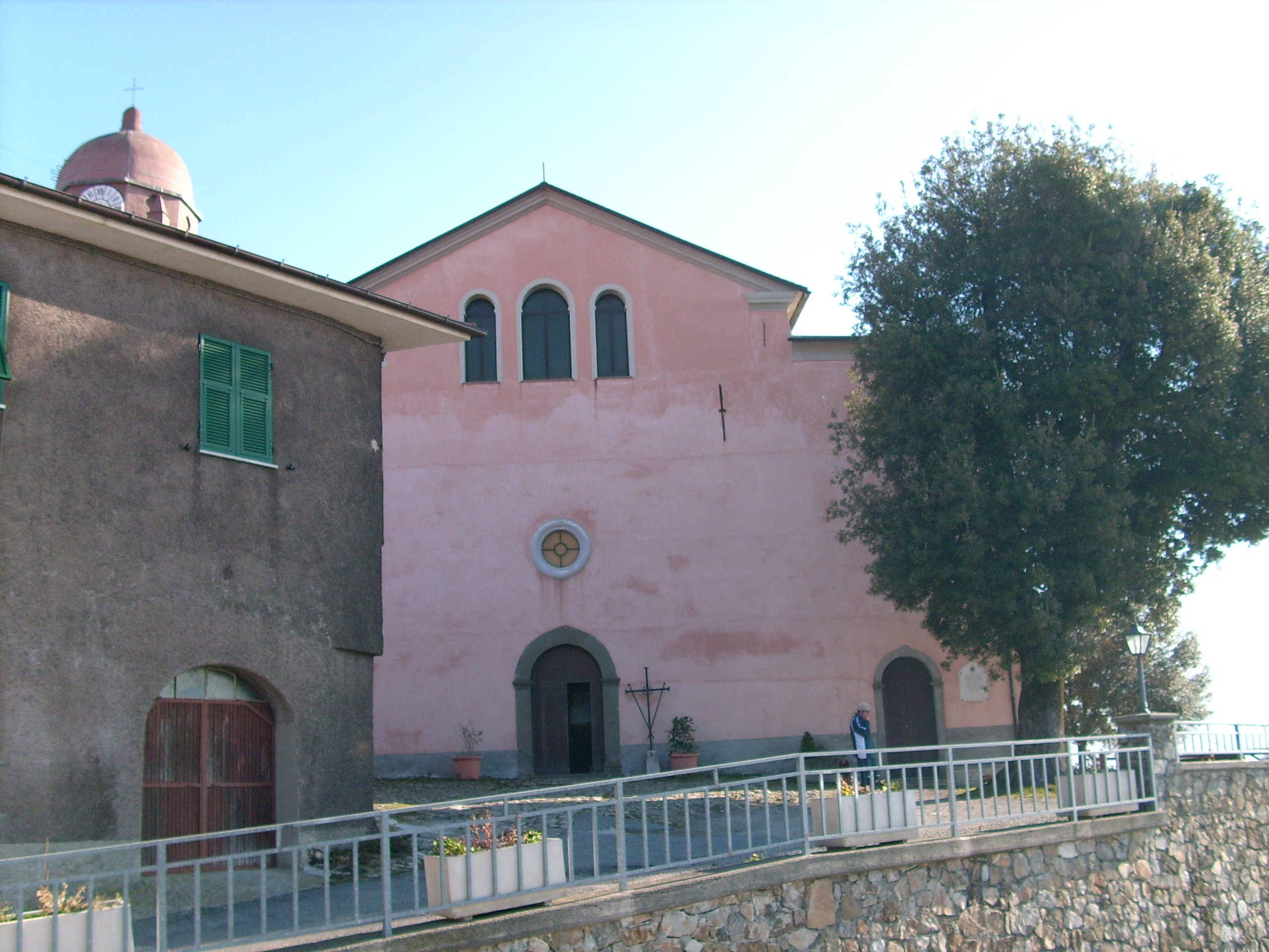 Chiesa di San Pietro, Zignago, Liguria, Italy